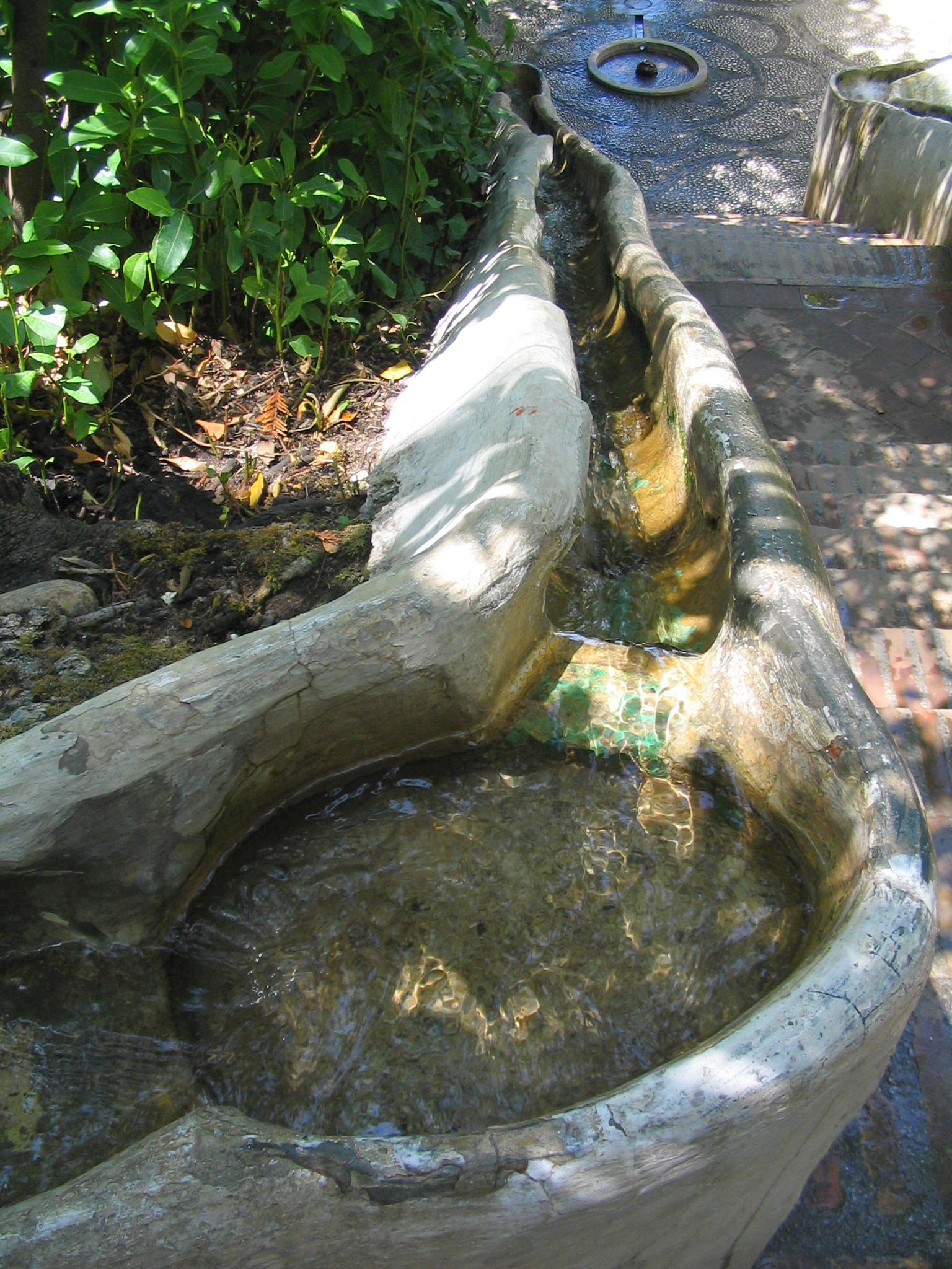 Rampe d’eau, Palais du Generalife, Alhambra de Grenade Espagne.